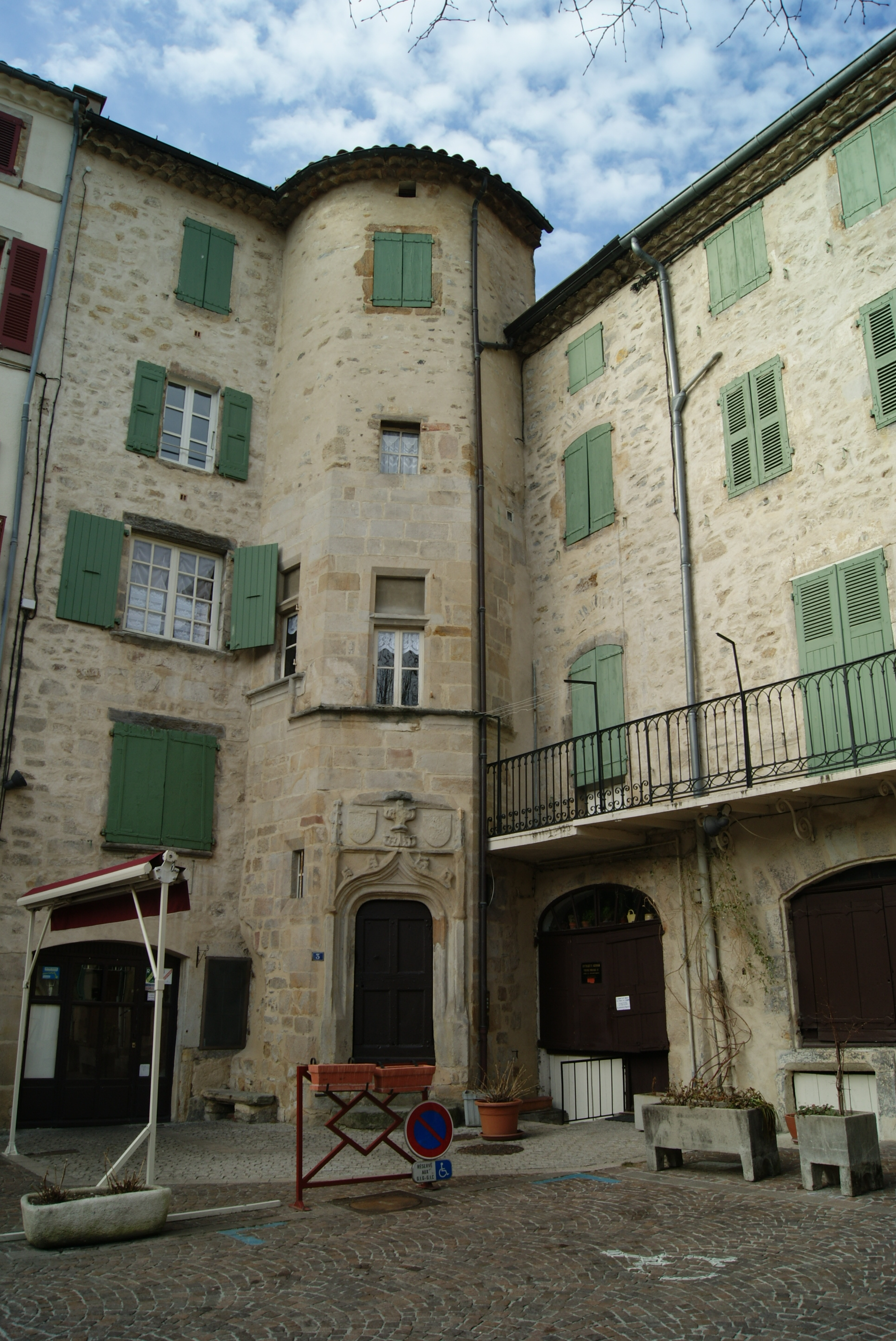 Privas, place de la République